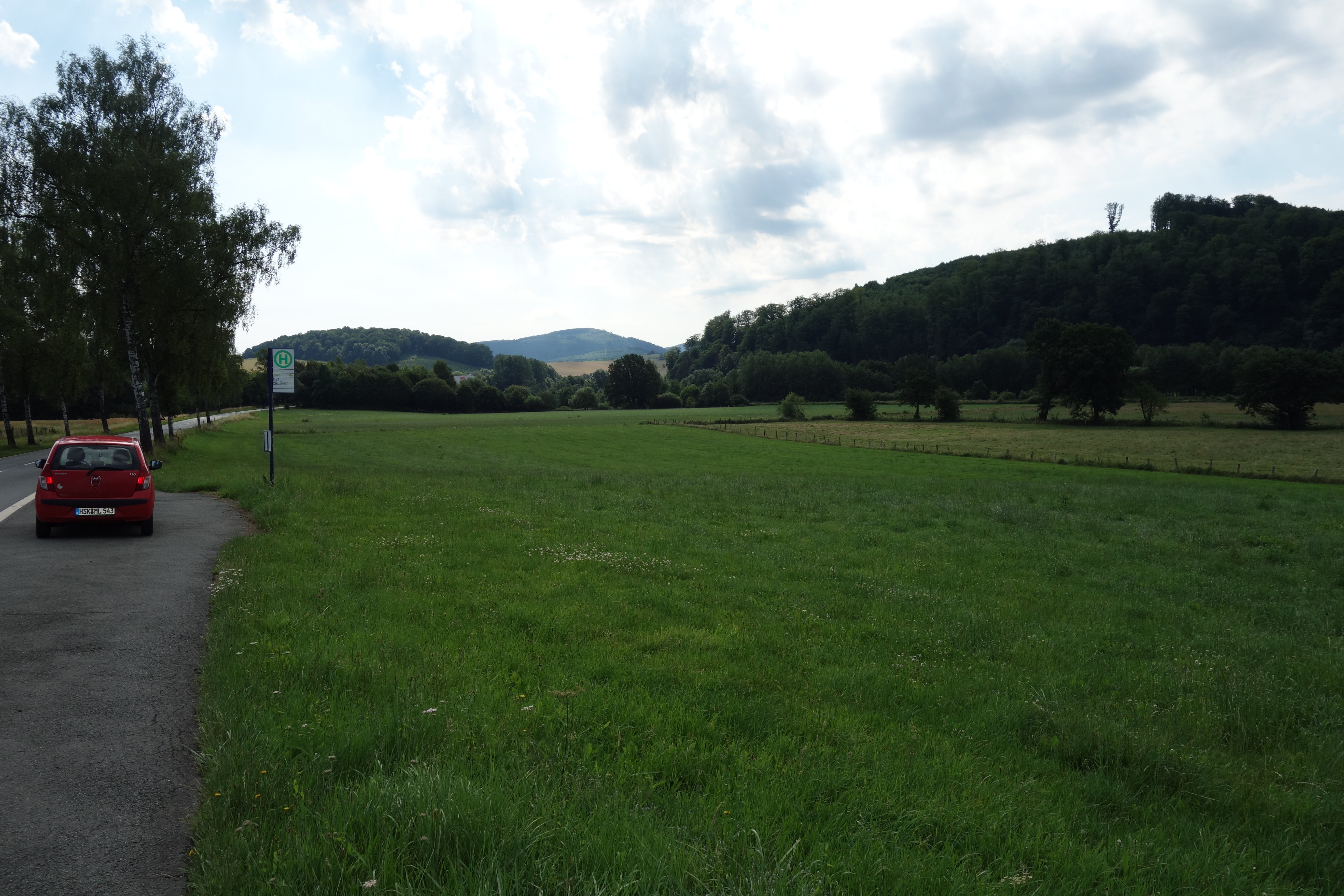 Grünland gehört zum Landschaftsschutzgebiet Ruhrtal südlich Ensthof, während der Wald Teil vom Naturschutzgebiet Ruhrtal bei Laer oder anderer Schutzgebiete ist.